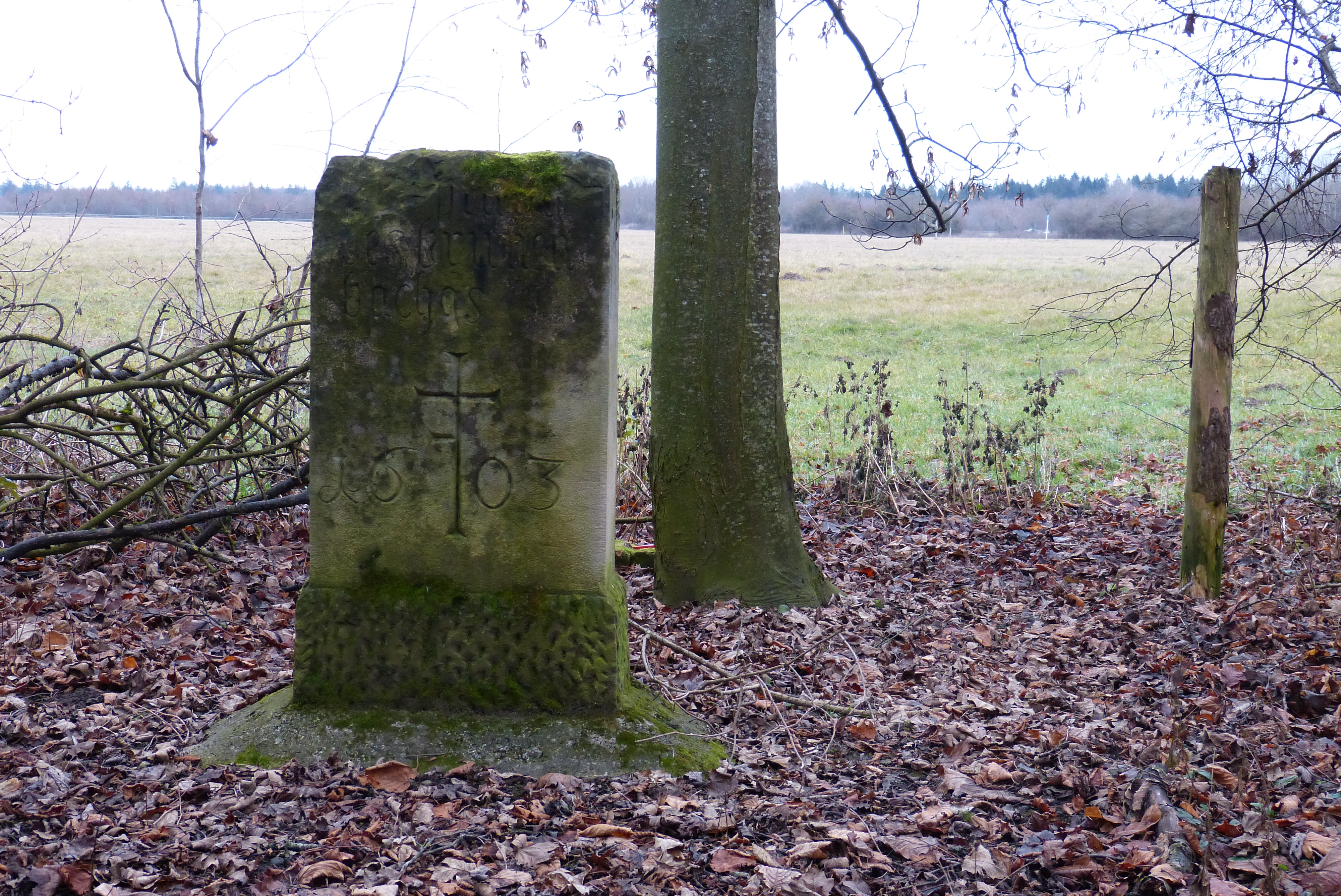 Der Brunnenbachstein (Kopie) in/bei Königsbrunn, der die (heute versiegte) südlichste Quelle des Brunnenbachs markierte, welcher Augsburg früher mit sauberem Trinkwasser versorgte. Der Stein trägt die Inschrift: "1603 - Ursprung des brunenbachs". Das Original des Brunnenbachsteins befindet sich heute im Königsbrunner Rathaus. Der Brunnenbach entspringt heute etwas weiter nördlich, fließt durch den Siebentischwald und mündet in Augsburg in den Lochbach.